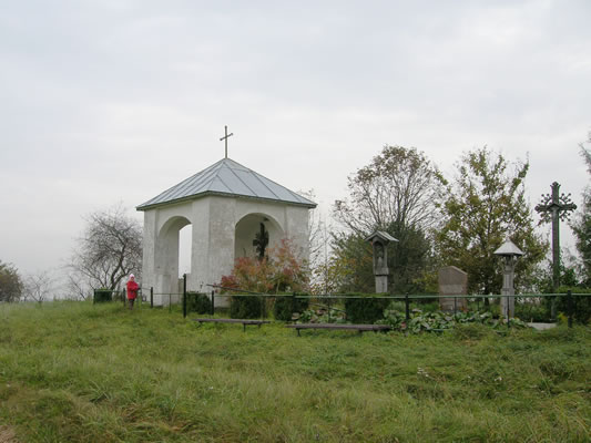 Mikališkio koplytėlė ir partizanų kapai. Igliaukos apylinkės.